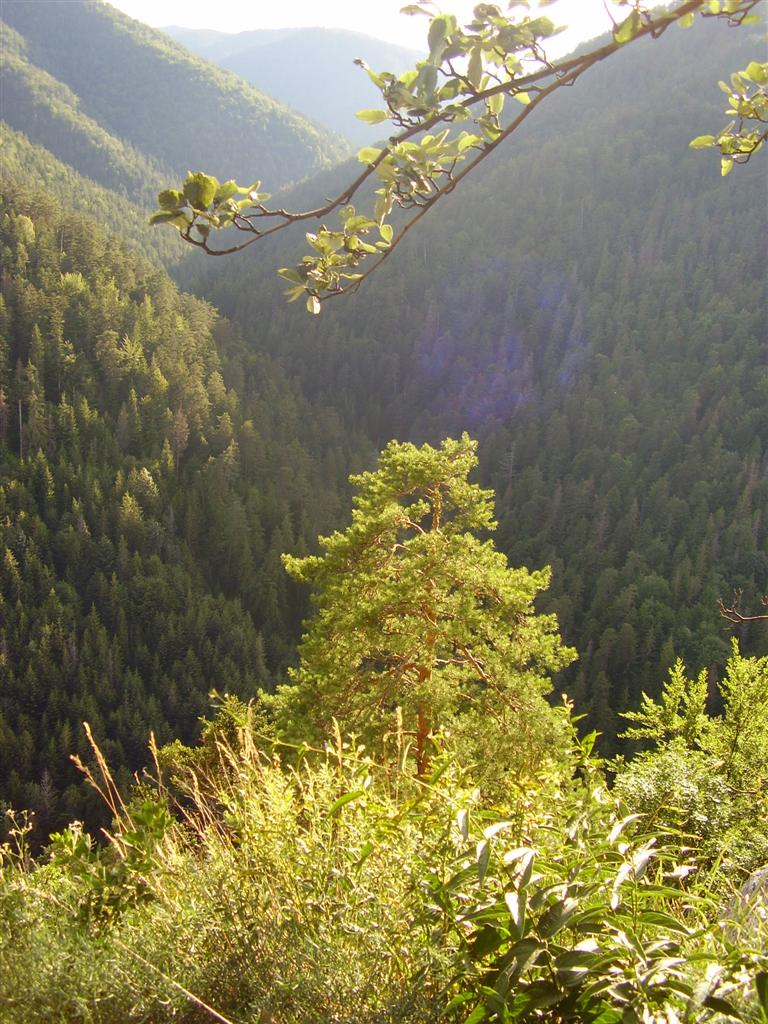 Pohled z Tomašovského výhledu na údolí Tomašovskej belej a údolie Bieleho potoka